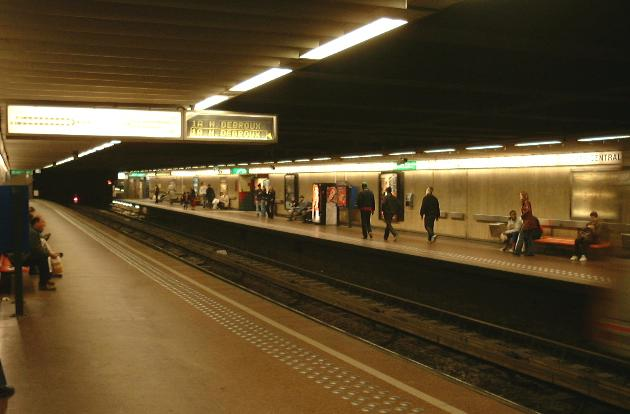 Quais de la station Gare Centrale, Bruxelles.